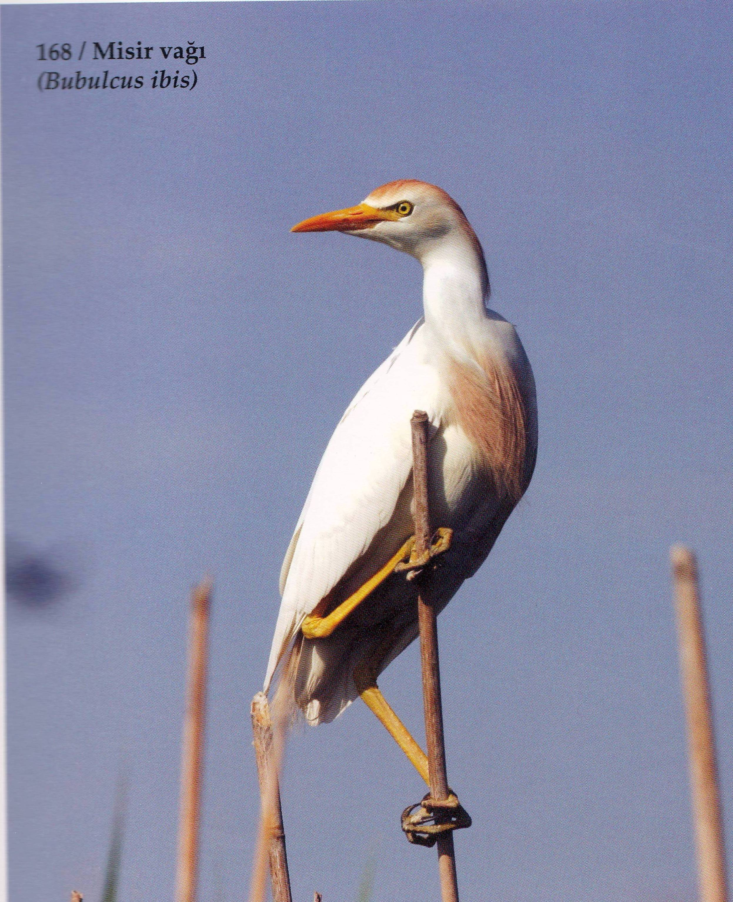 Saatlı Misir Vağı